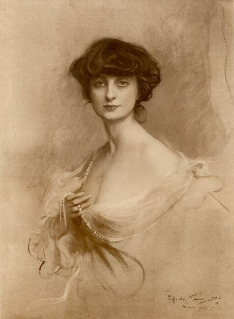 La Contessa Anna de Noailles